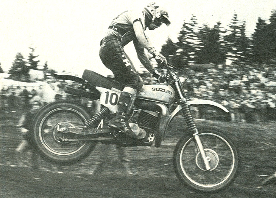 Roger DeCoster at Unadilla